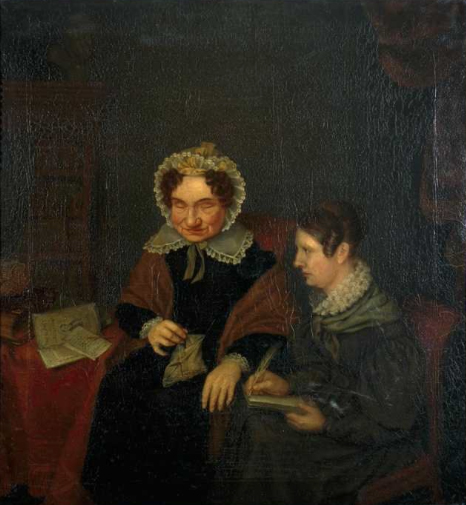 Portret van Petronella Moens (1762-1843) en Antonia Elisabeth Camphuis (1807/1808-1842)